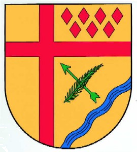 Wappen von Mannebach (Eifel).